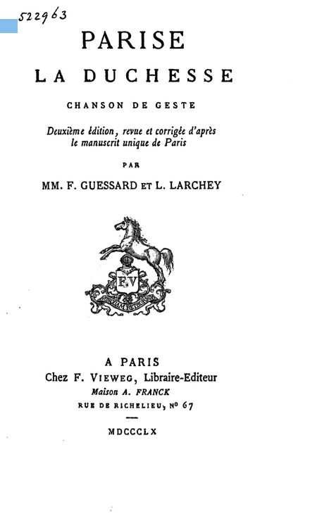 Parise la Duchesse, chanson de geste